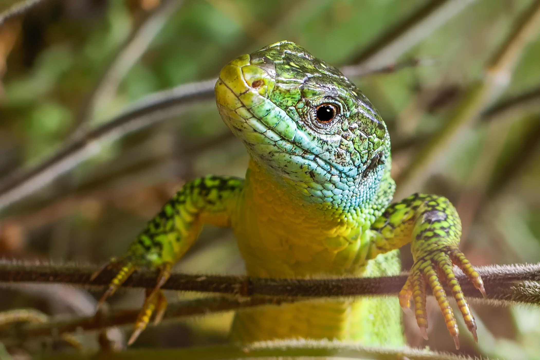 Nur kurz zeigte sich die Westliche Smaragdeidechse (Lacerta bilineata) bis sie sich wieder in das Gebüsch zurückzog. (NSG Dortebachtal/Mosel)